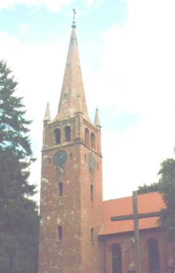 Kościół w Bruskowie Wielkim